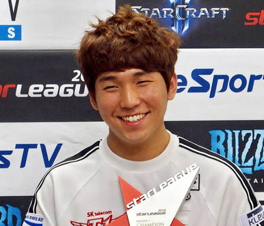 스타리그 2016 시즌 1 우승자 박령우 선수 공동 인터뷰